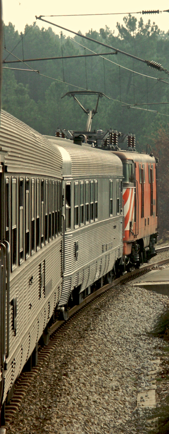 Tipo: Comboio Especial da APAC * [Pampilhosa - Vilar Formoso - Figueira da Foz] Local: antes de Contenças [Linha da Beira Alta, PK 131] Data e hora: 8 de Dezembro de 2007 [12h39] Material: Locomotiva 2504 + 3 carruagens Sorefame por ocasião dos 125 anos da Linha da Beira Alta (1882-2007) e dos 50 anos de serviço comercial das Locomotivas Eléctricas 2500 (1957-2007).